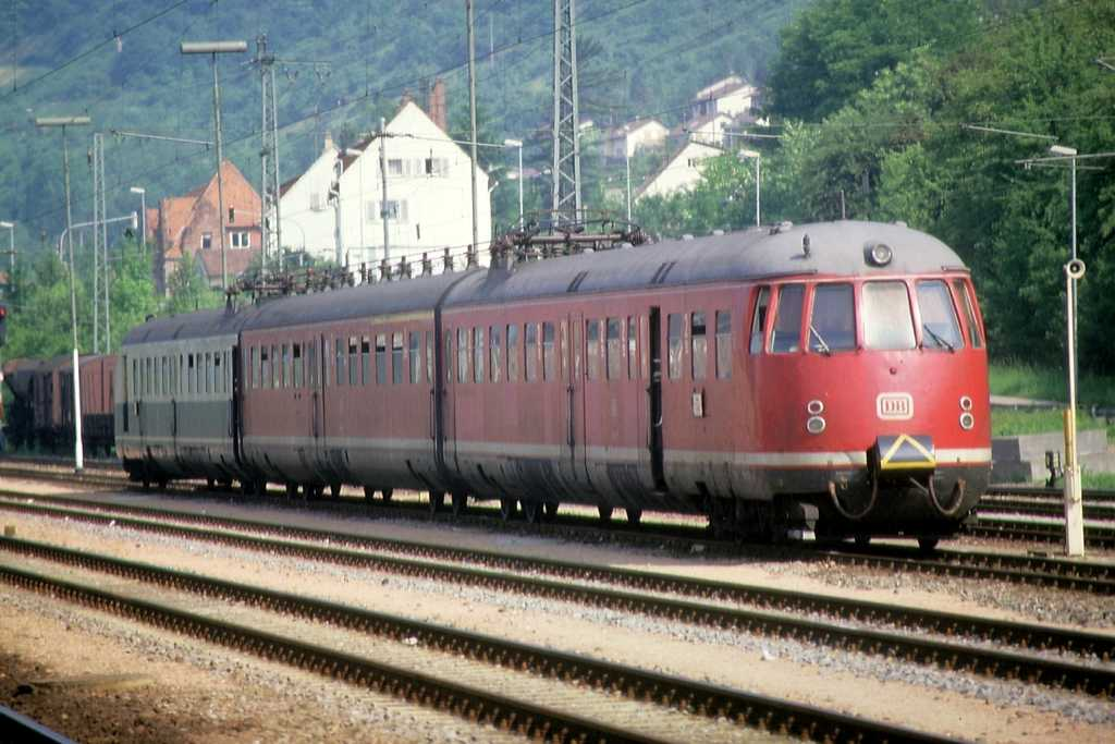 Beschreibung: DB Baureihe 456 in Neckarelz Quelle: selbst fotografiert 27.5.1986 Fotograf: Benedikt Dohmen (user: Benedictus), Archiv-Nr. 90/3 Copyright Status: GNU Freie Dokumentationslizenz